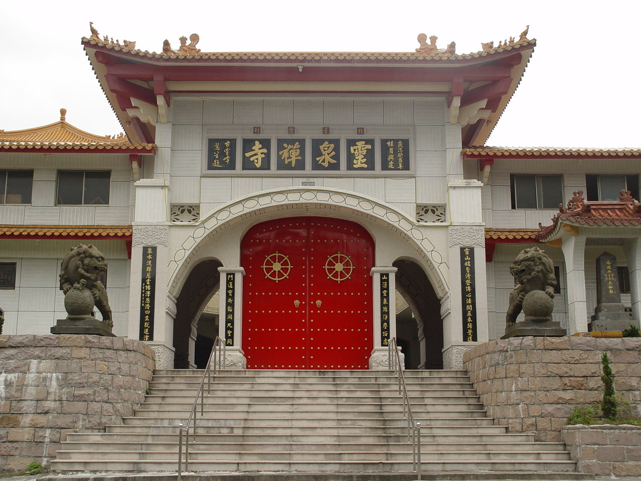 基隆市月眉山的靈泉禪寺山門。